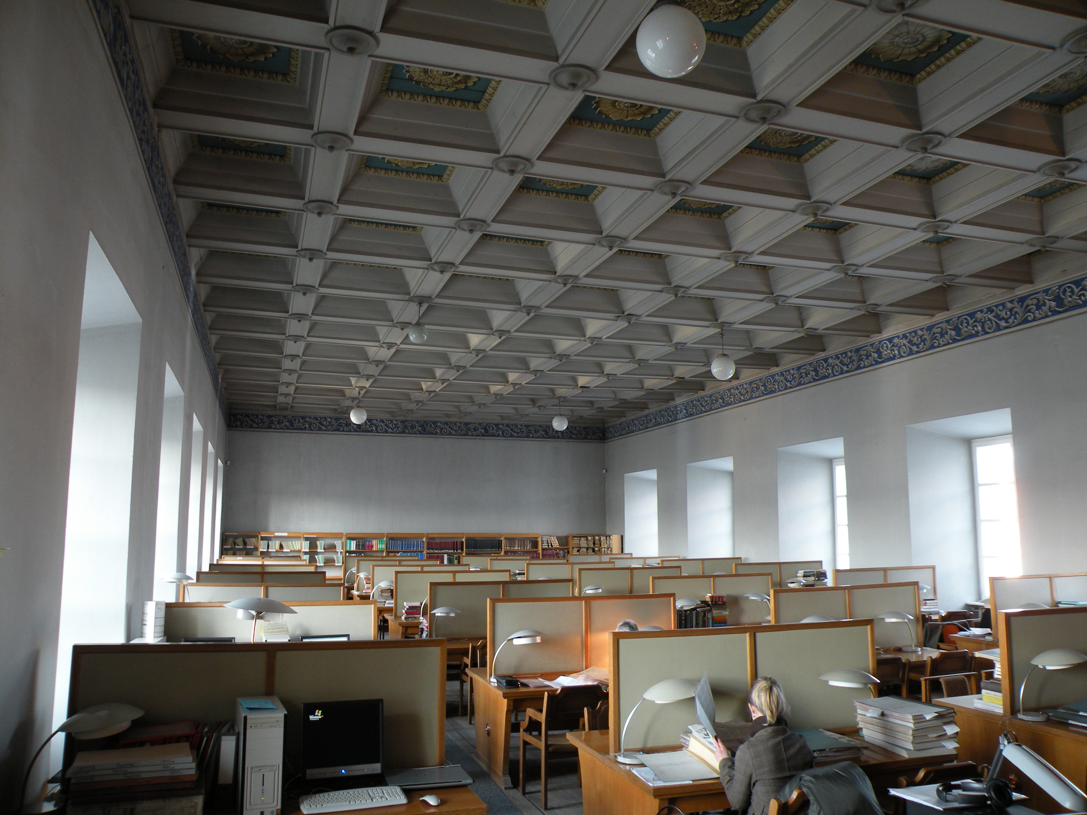 VU bibliotekos profesorių skaitykla